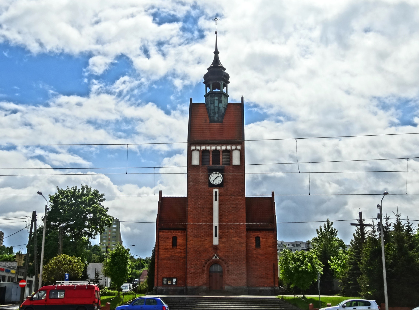 Kościół katolicki p.w. św. Józefa rzemieślnika w Bydgoszczy przy ul. Toruńskiej